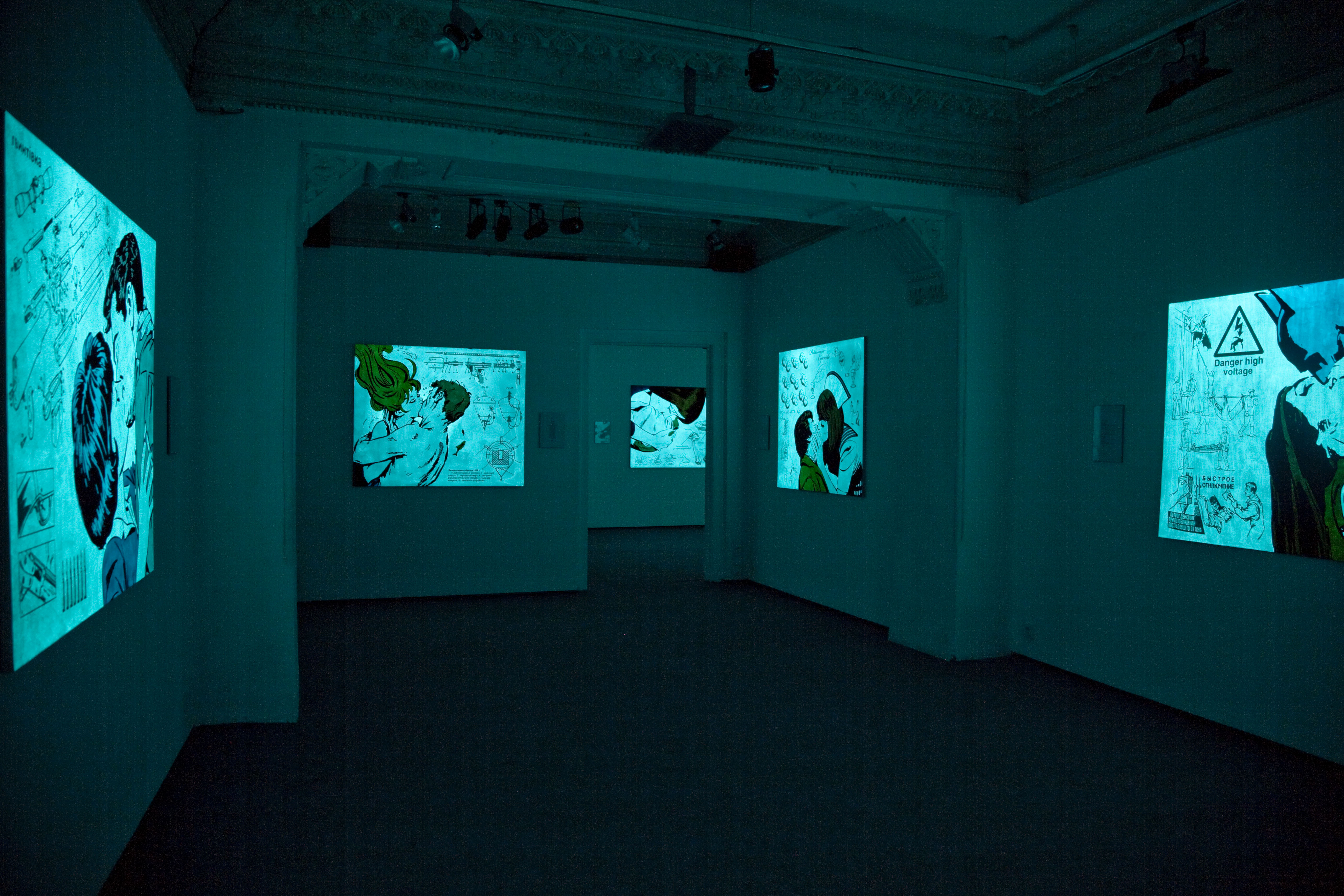 Роберт Саллер "Man Woman Blackout", 2010